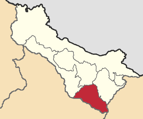 Mapa localizacor del cantón Bolívar, Carchi, Ecuador